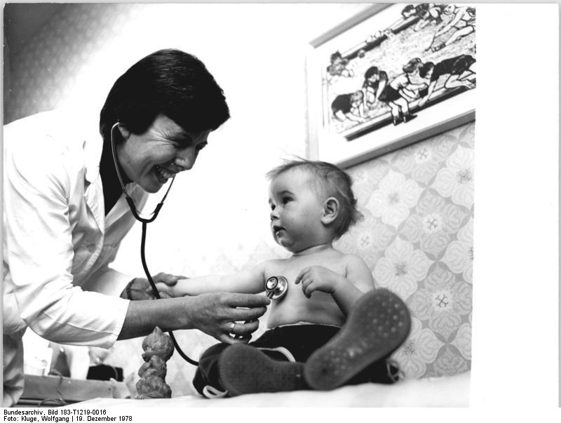 Mügeln, kinderärztliche Untersuchung ADN-ZB Kluge 19.12.78 Bez. Leipzig: Landambulatorium. Keine Angst vor Frau Doktor hat die eineinhalbjährige Daniela. Wenn die Mutti mit ihr in das Landambulatorium Mügeln zur Kinderärztin Ursula Sauerzapfe kommt, muß sie nicht lange warten, denn das Bestellsystem funktioniert gut. Das modern eingerichtete Landambulatorium sorgt für die medizinische Betreuung der rund 12000 Einwohner des Gemeindeverbandes Mügeln. (siehe auch 17 und 18 N)